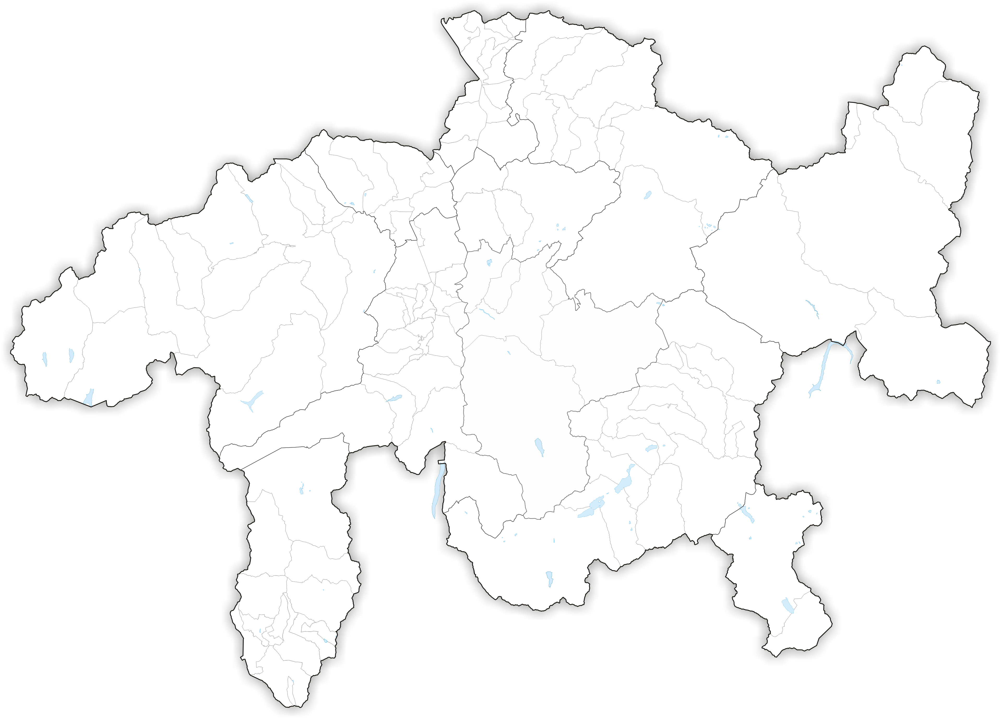 Municipalities in Canton Graubünden